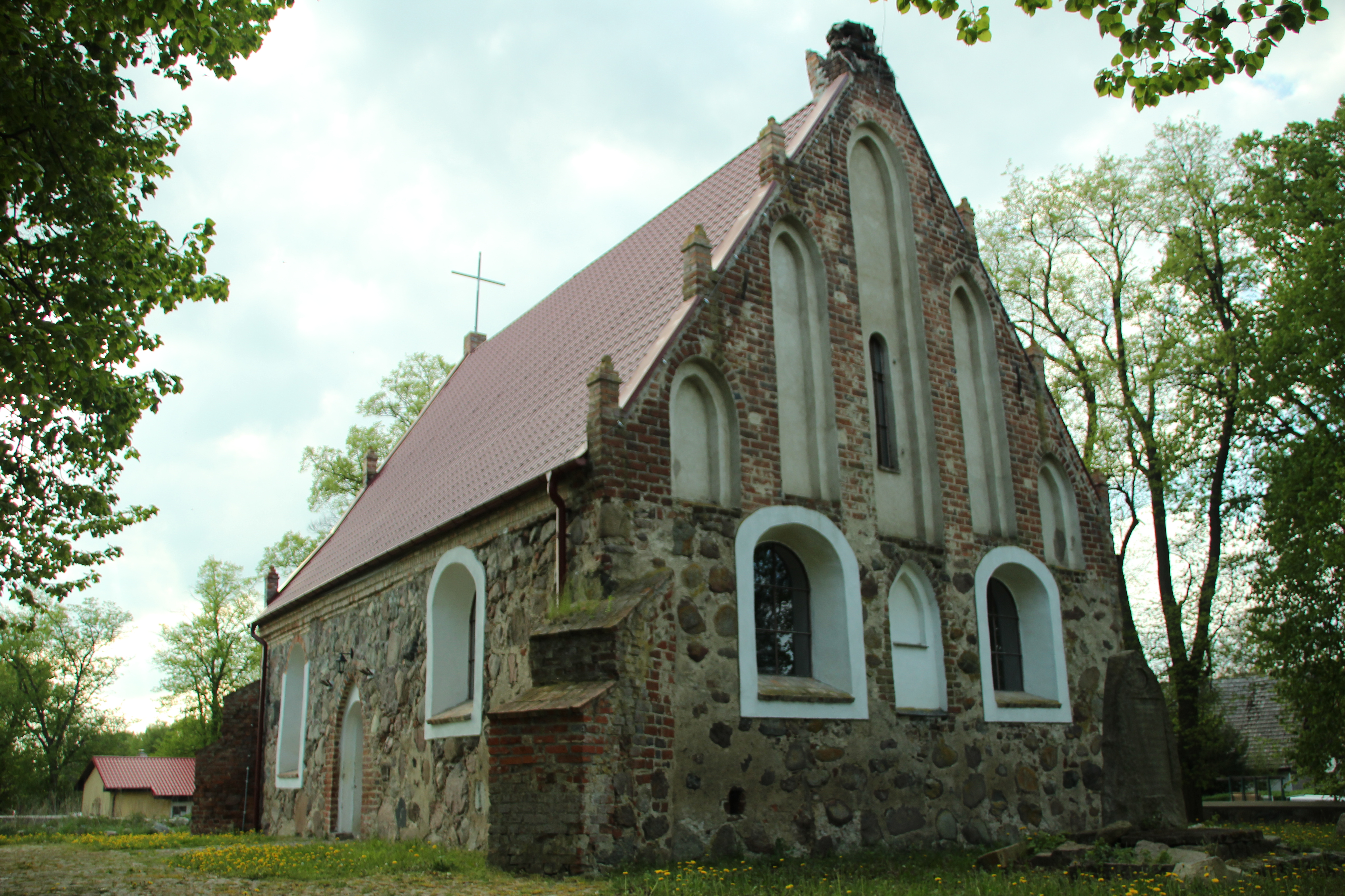 Rokity - rzymskokatolicki kościół filialny p.w. Najświętszego Serca Pana Jezusa, XV/XVI (decyzja ruina)